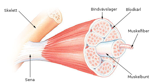 En ombearbetad bild från: [1] Som Muskelstruktur.jpg men med mindre JPEG-artefakter.